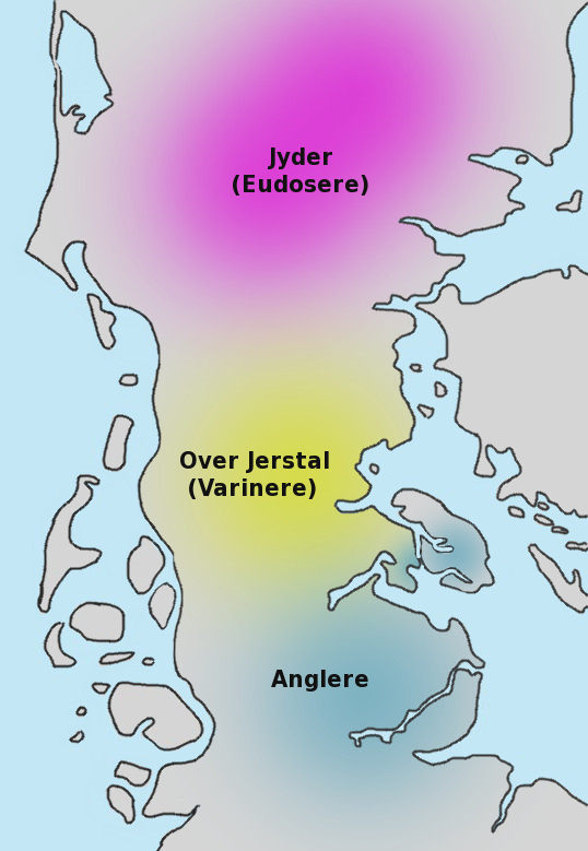 Over Jerstal-kredsens, jydernes og anglernes stammeområder omkring 100 e.Kr.